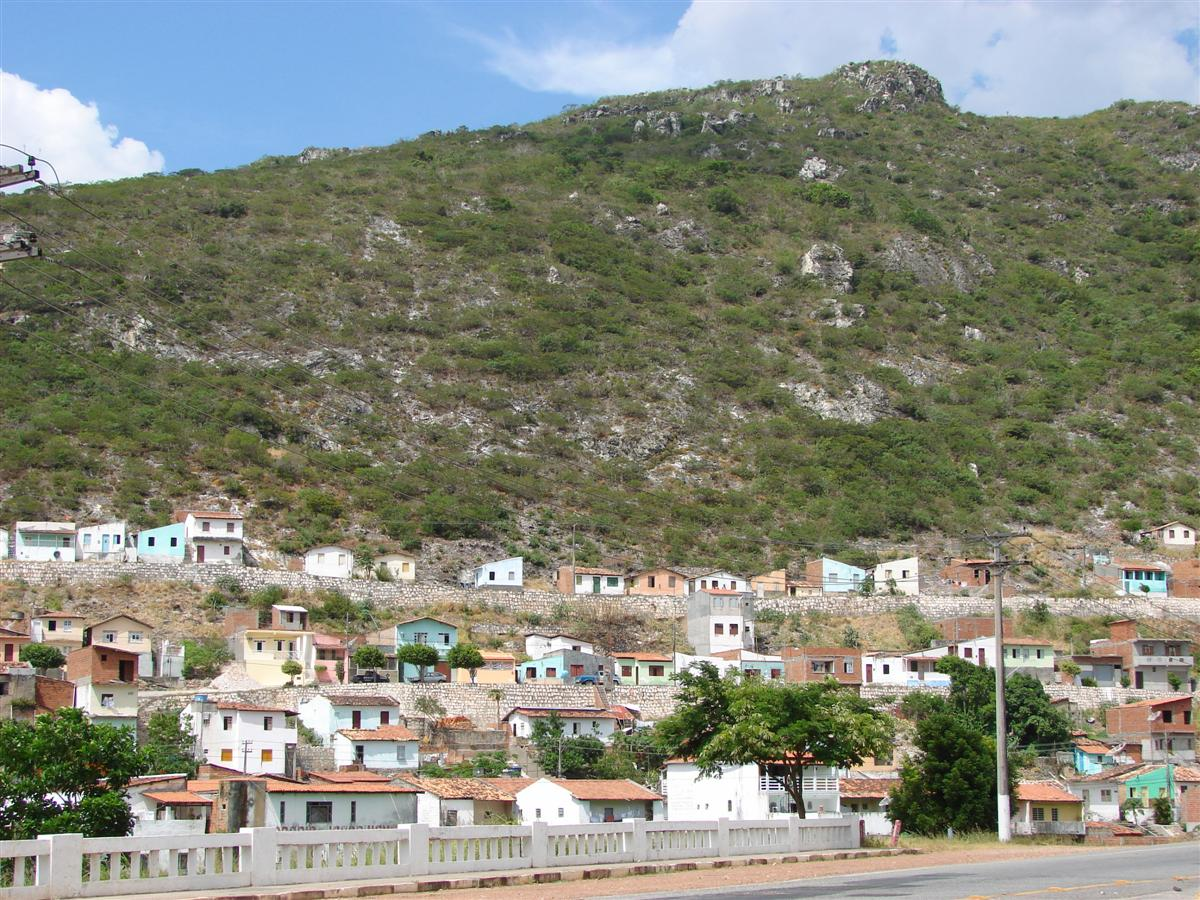 Vista parcial da cidade de Jacobina, BA